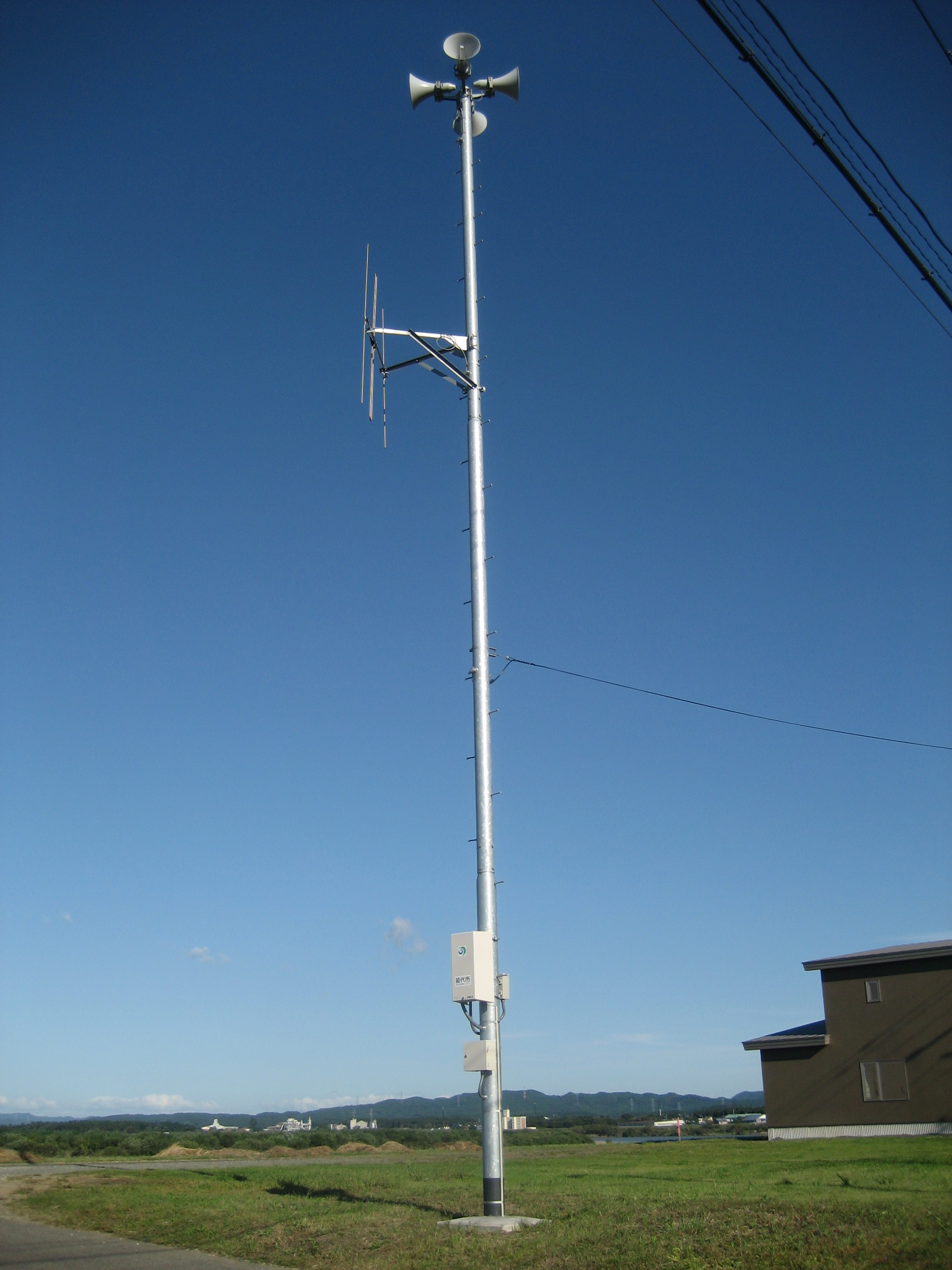 秋田県能代市内に設置されている市町村防災行政無線屋外スピーカー